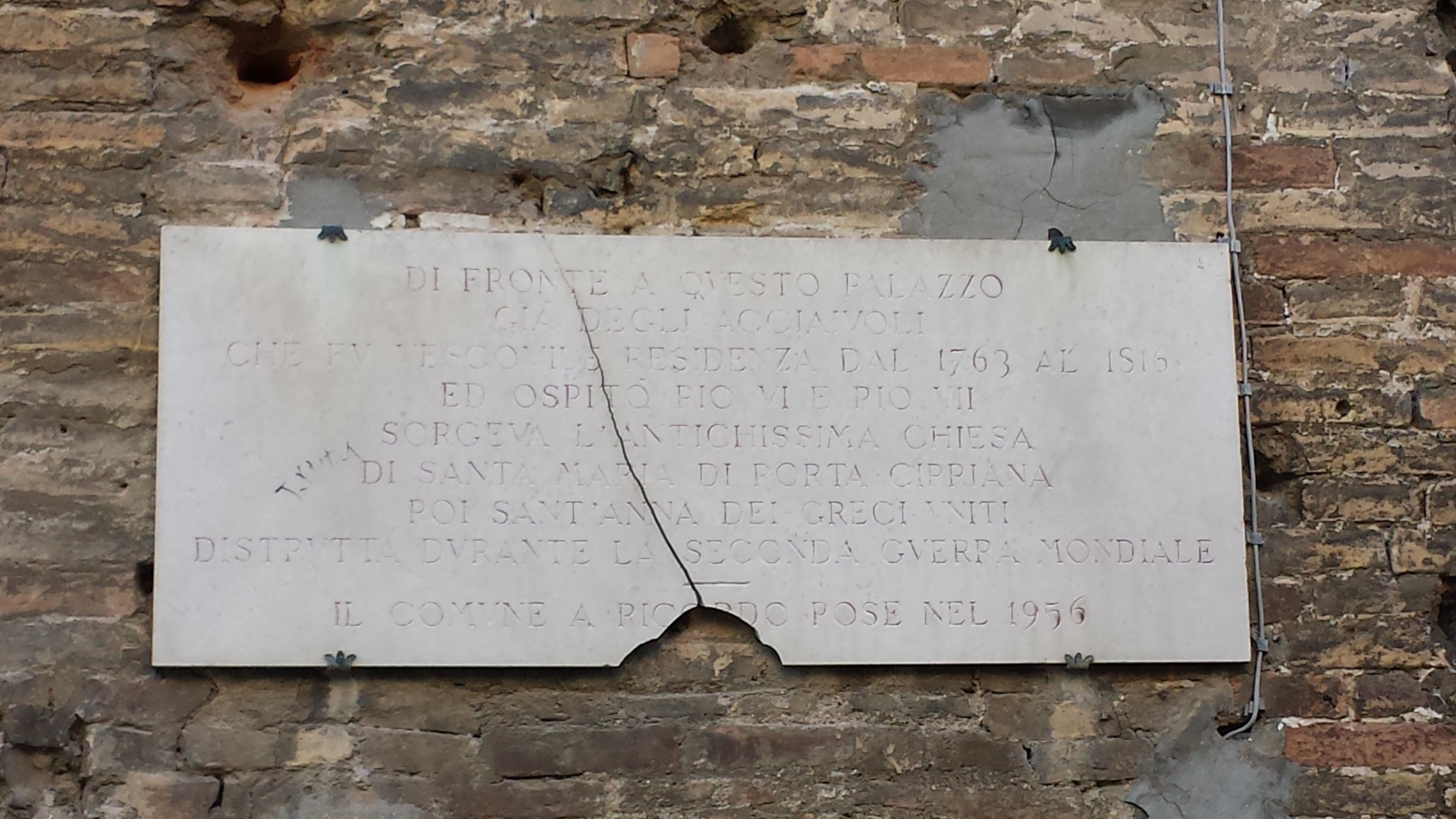 Targa a ricordo della chiesa di Sant'Anna